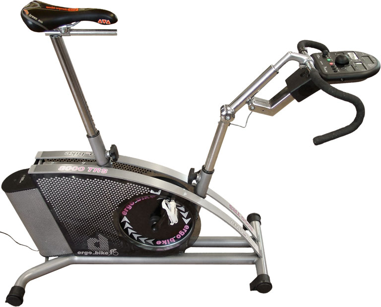 Fahrrad-Ergometer, Modell „ergo_bike 8000 TRS“ der Firma daum elektronik. Das Ergometer verfügt sowohl über Watt-gesteuerte als auch Puls-gesteuerte Trainingsprogramme. Des weiteren ist es möglich mit diesem Ergometer die Tour de France von 1997 sowie einige Ironman-Strecken von der Belastung her nachzufahren.